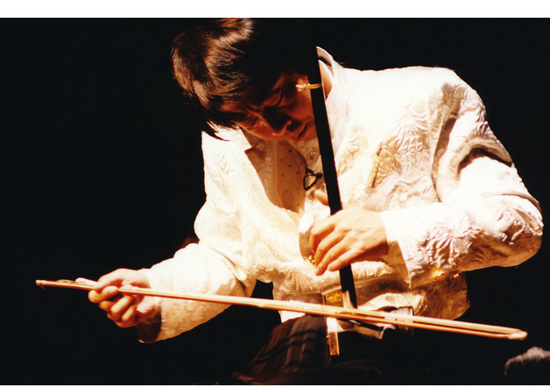 演奏会での撮影